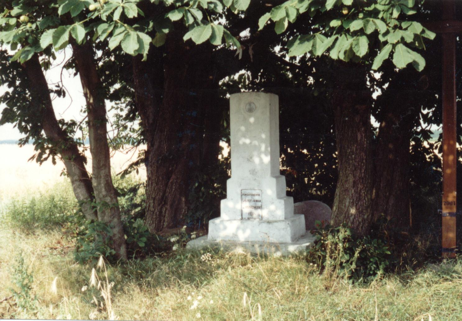 Śródpolna kapliczka na polach koło Starej Rawy